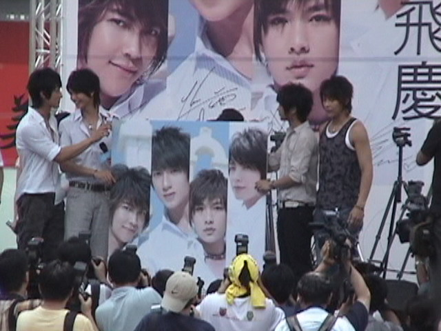 Fahrenheit